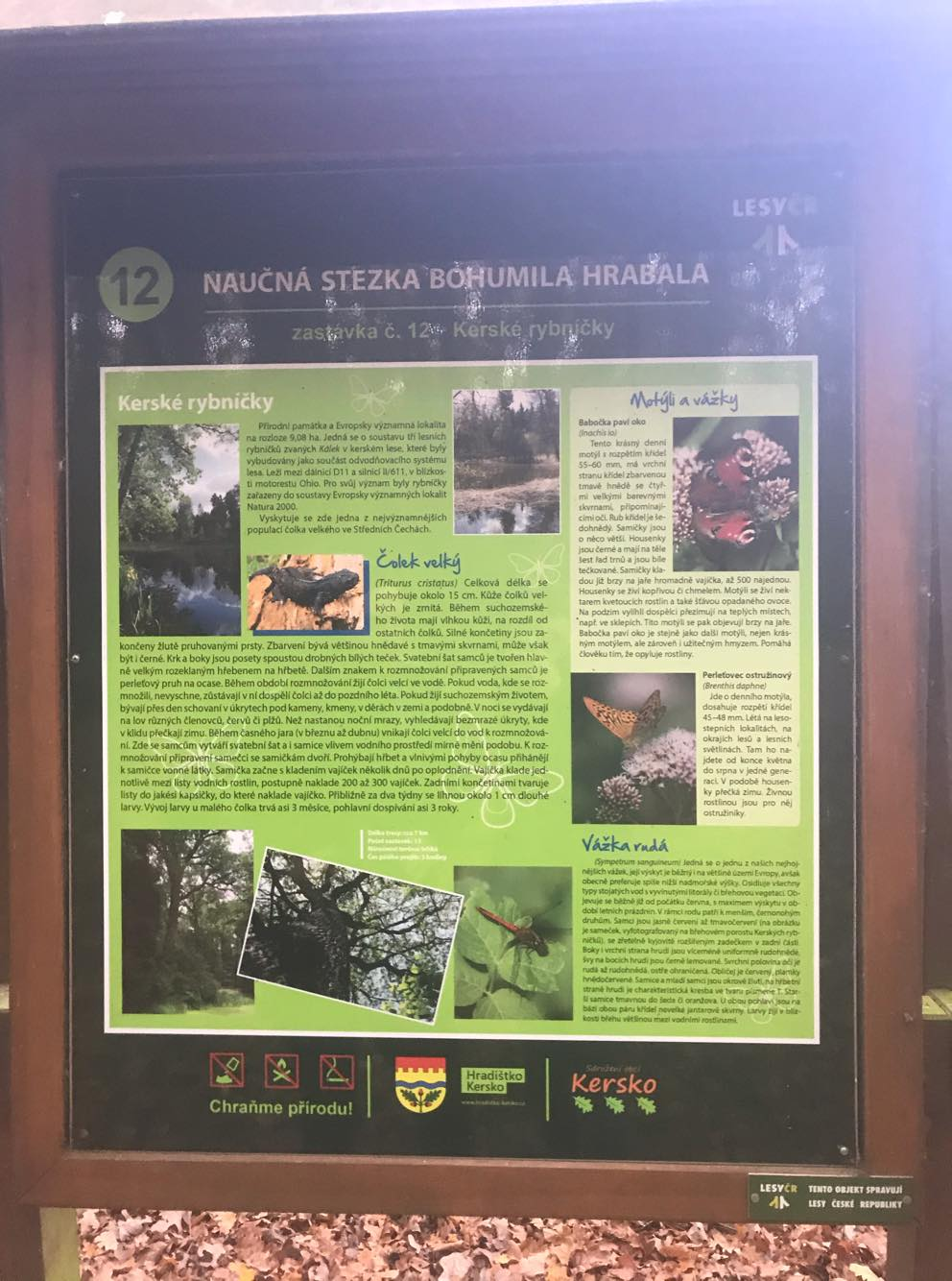 Informace o žijící fauně. Je zde znázorněn čolek velký, který je předmětem ochrany.